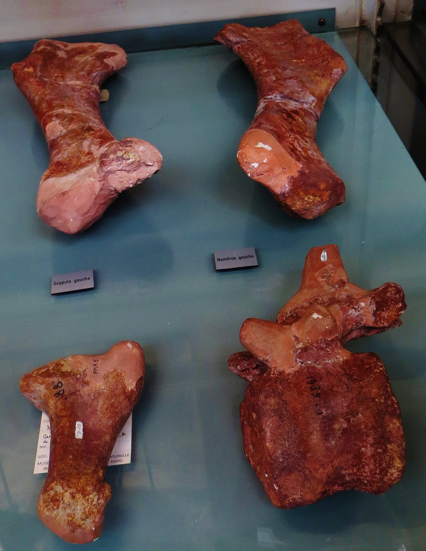 Fossil of Rhabdodon, an extinct reptile- Took the photo at Musee d'Histoire Naturelle, Paris